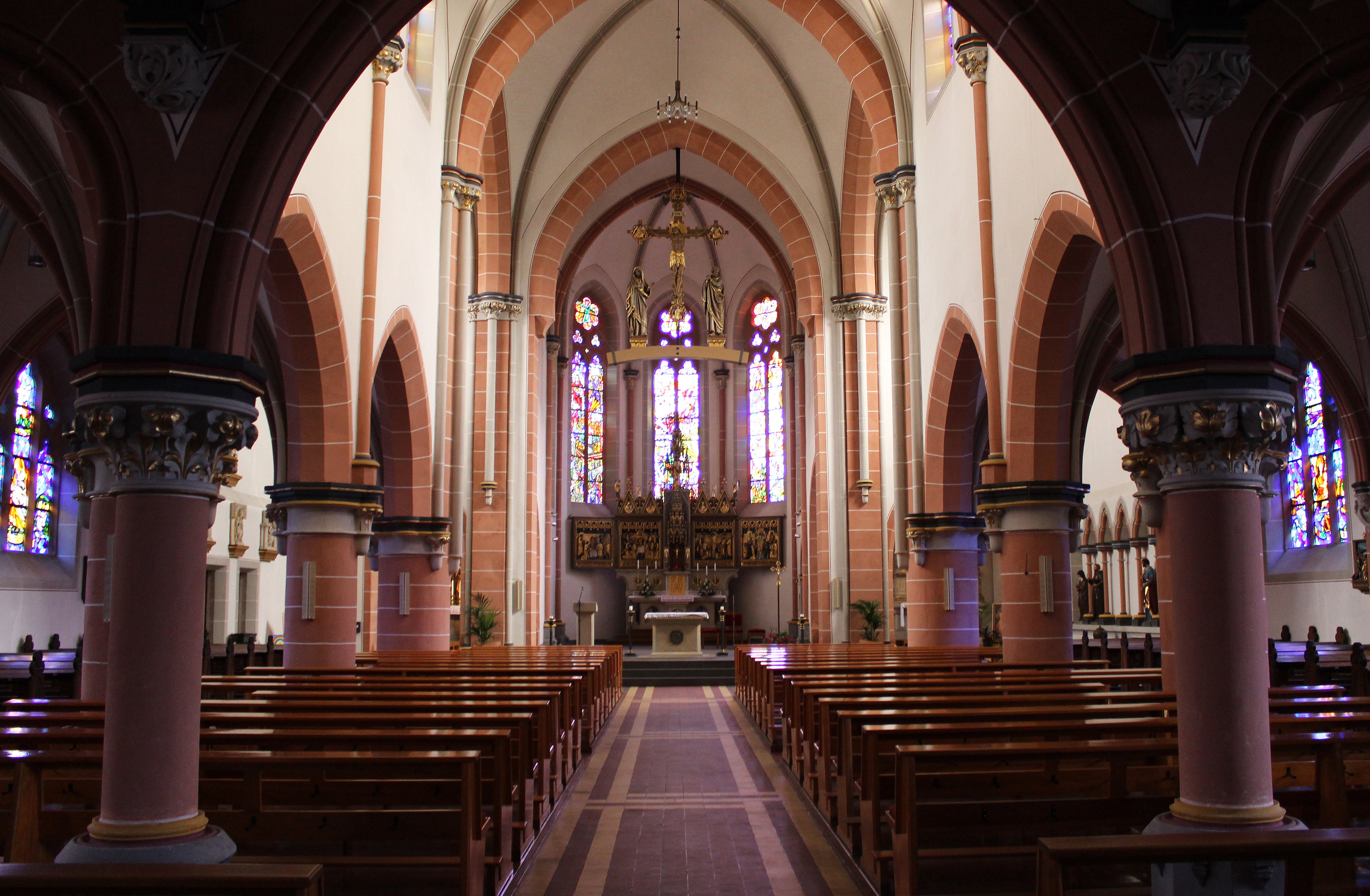 Blick ins Innere der katholischen Pfarrkirche St. Martin in Schwalbach, Landkreis Saarlouis, Saarland